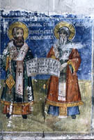 Фреска в охридската църква "Света Богородица Челница".